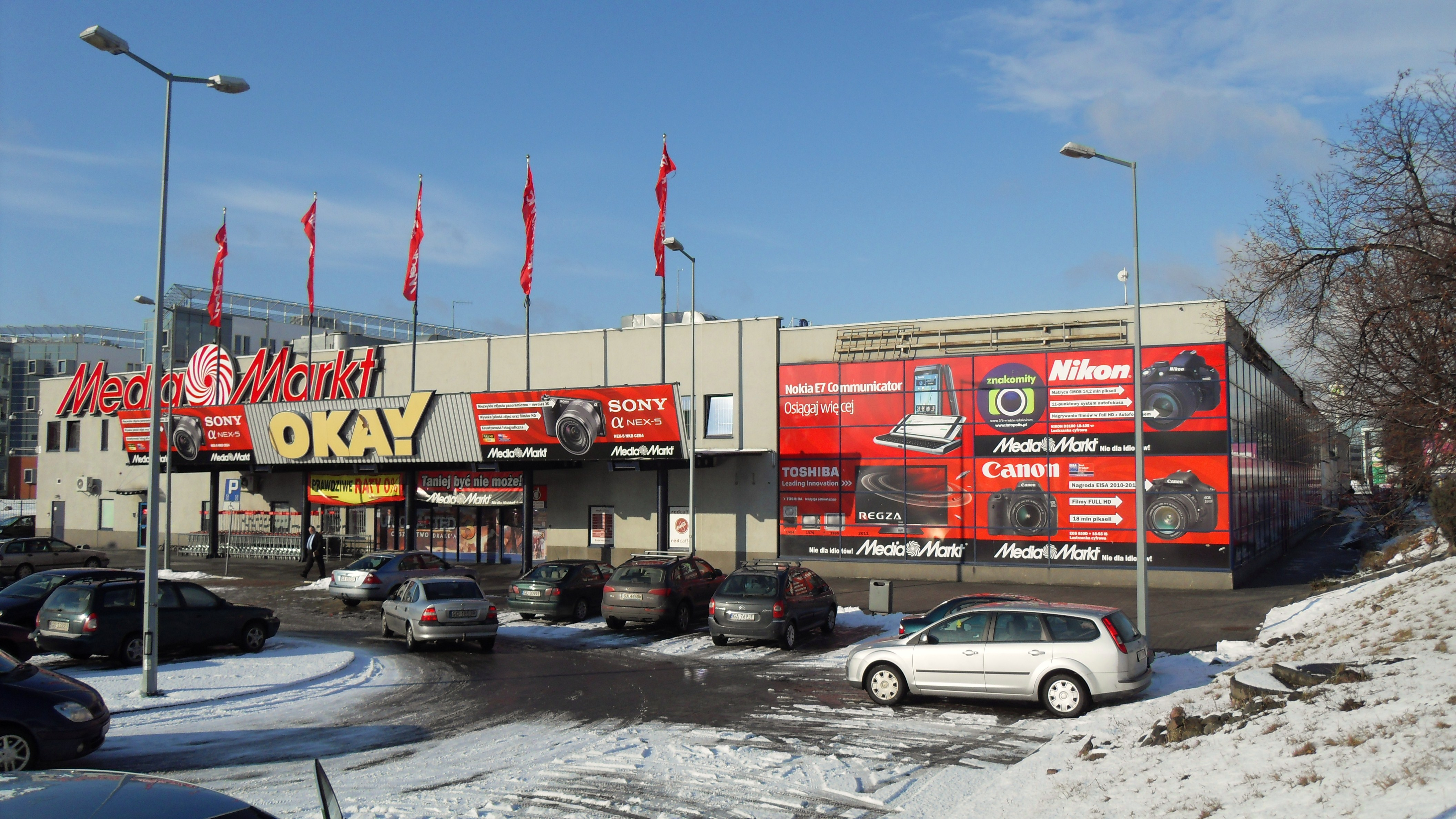 Gdańsk Oliwa. Al. Grunwaldzka 270, "Media Markt".